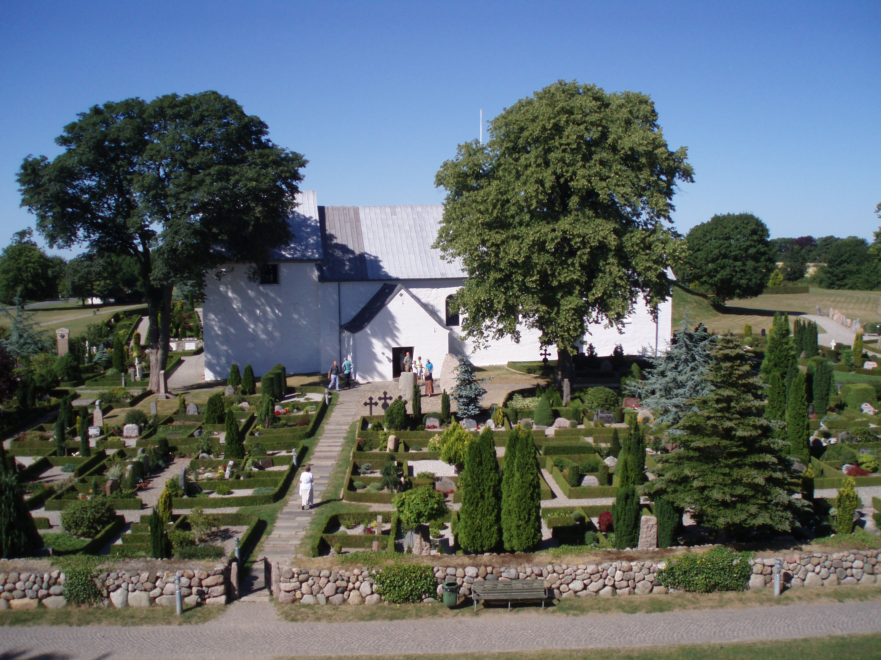 Jelling Kirke in Jelling, Denmark